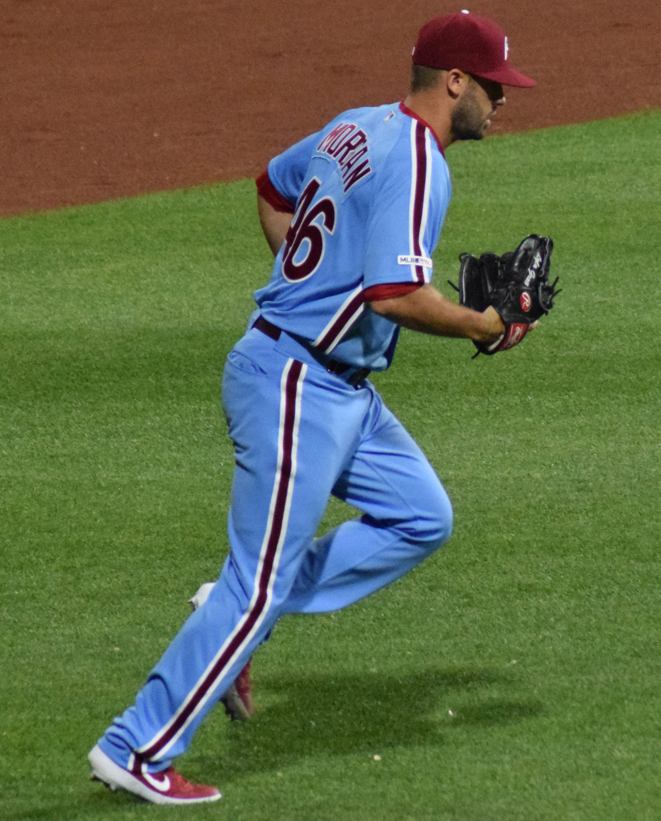 Adam Morgan